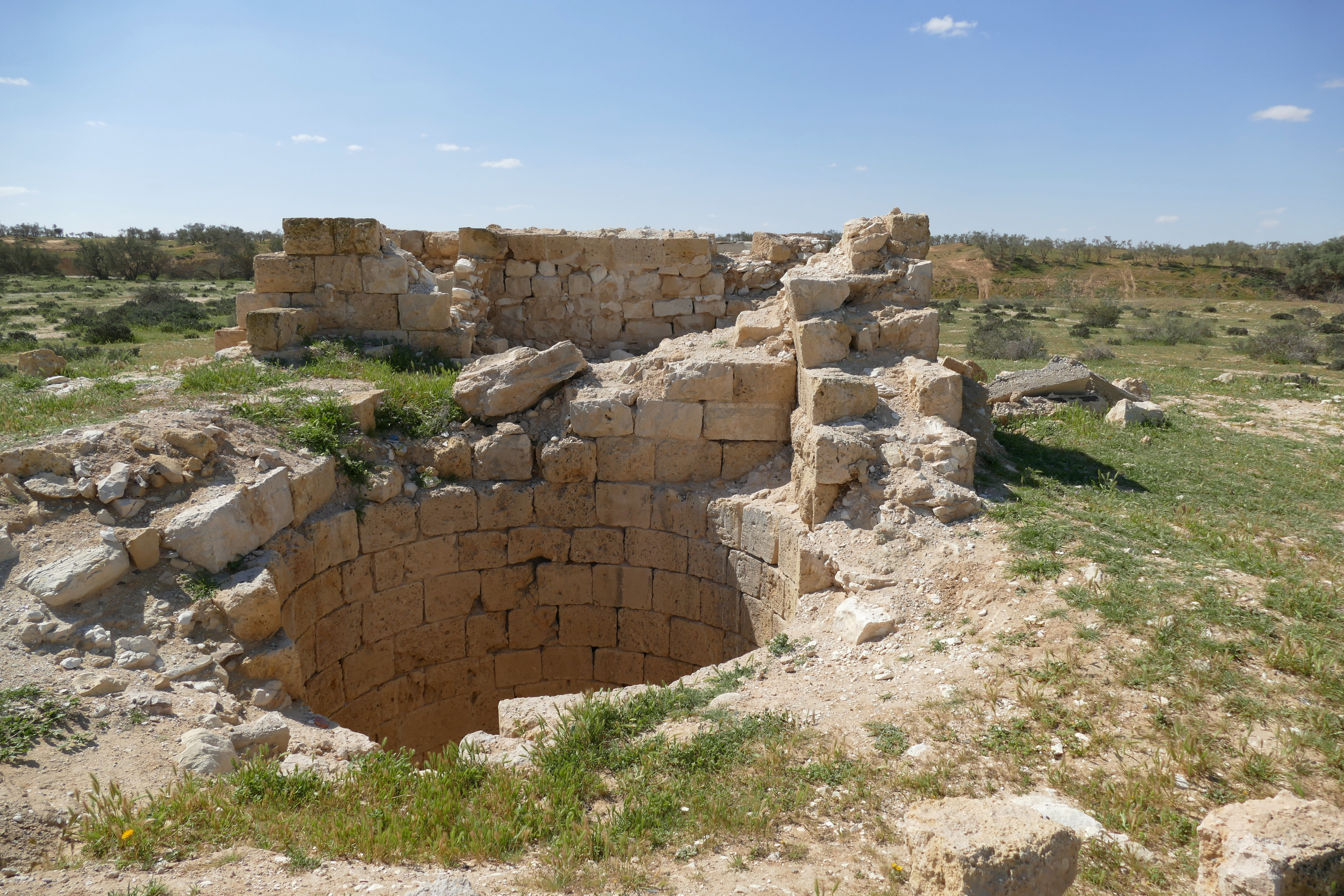 בור מים בנחל סכר, נחל אכזב בנגב